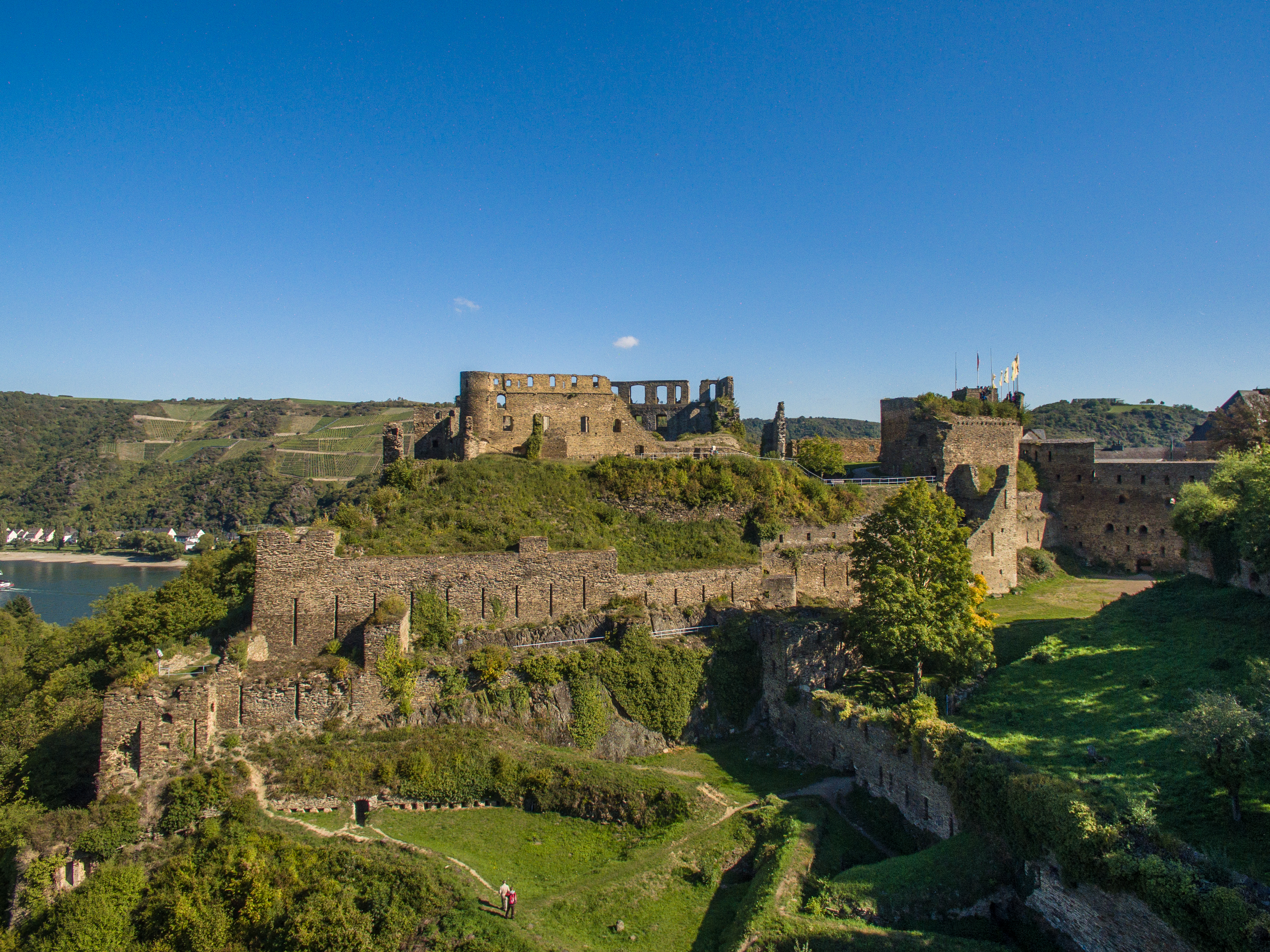 Luftaufnahme der Burg Rheinfels in St. Goar